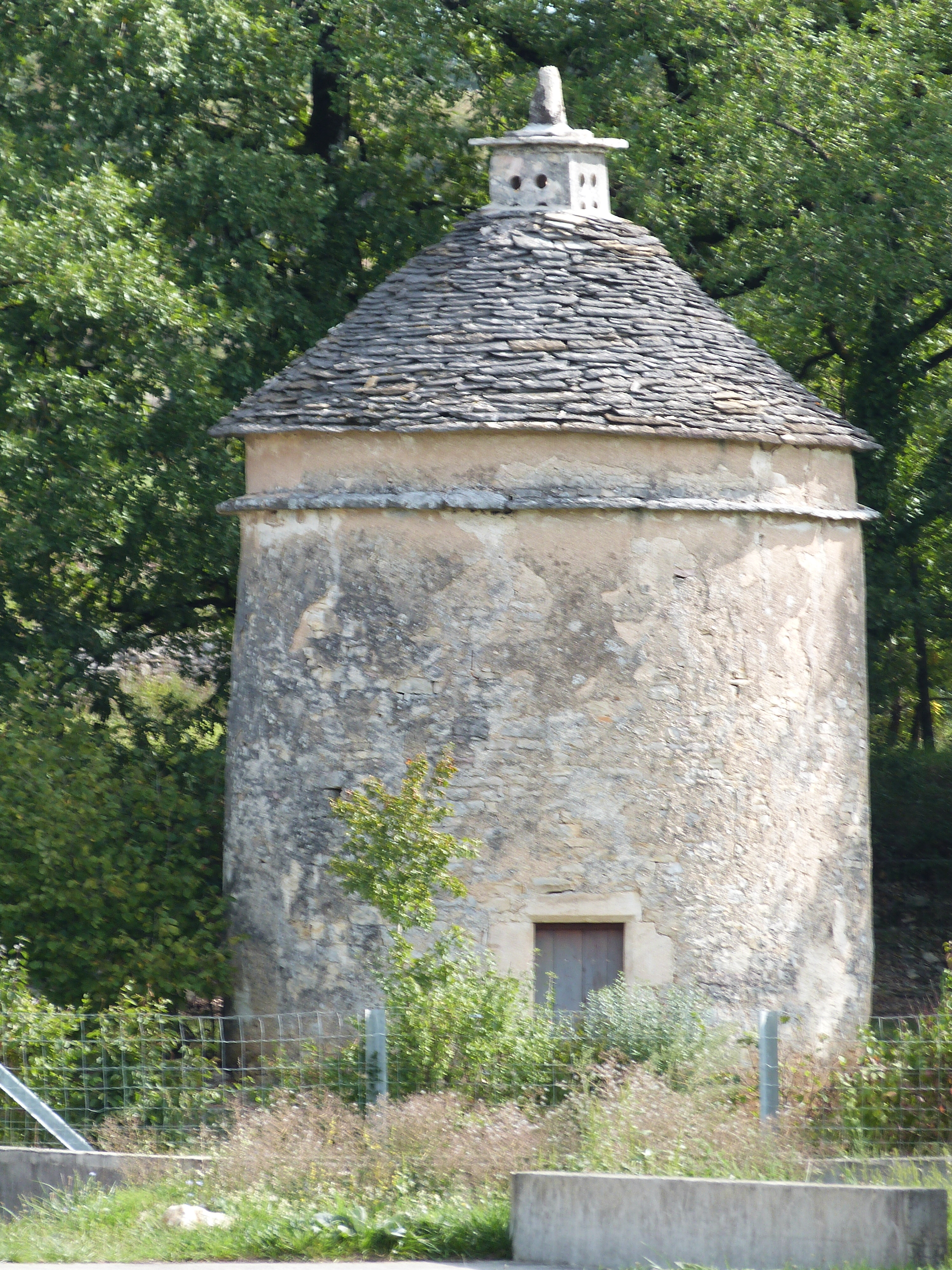 Pigeonnier du Foirail (Inscrit) .